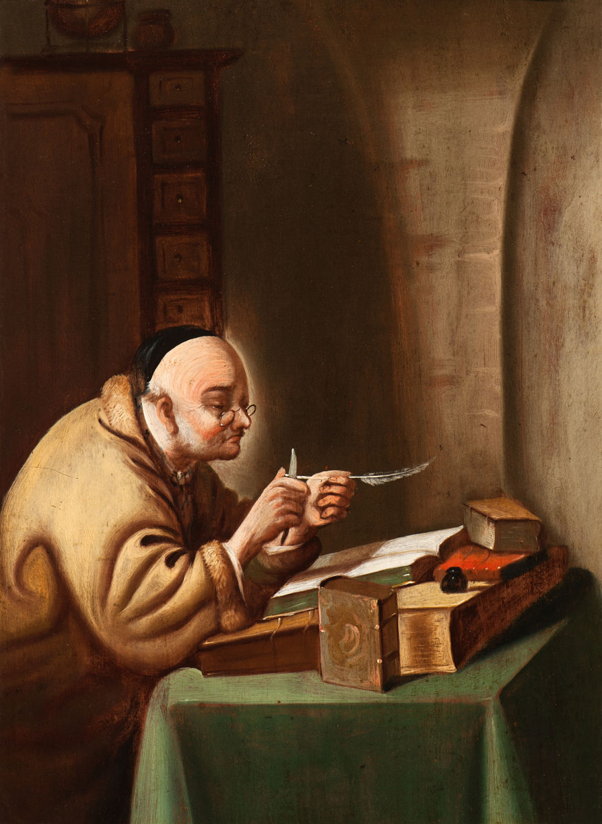 Ein Schreiber am Pult, seine Feder schneidend. Öl auf Holz. Unsigniert. 32,5 x 24 cm